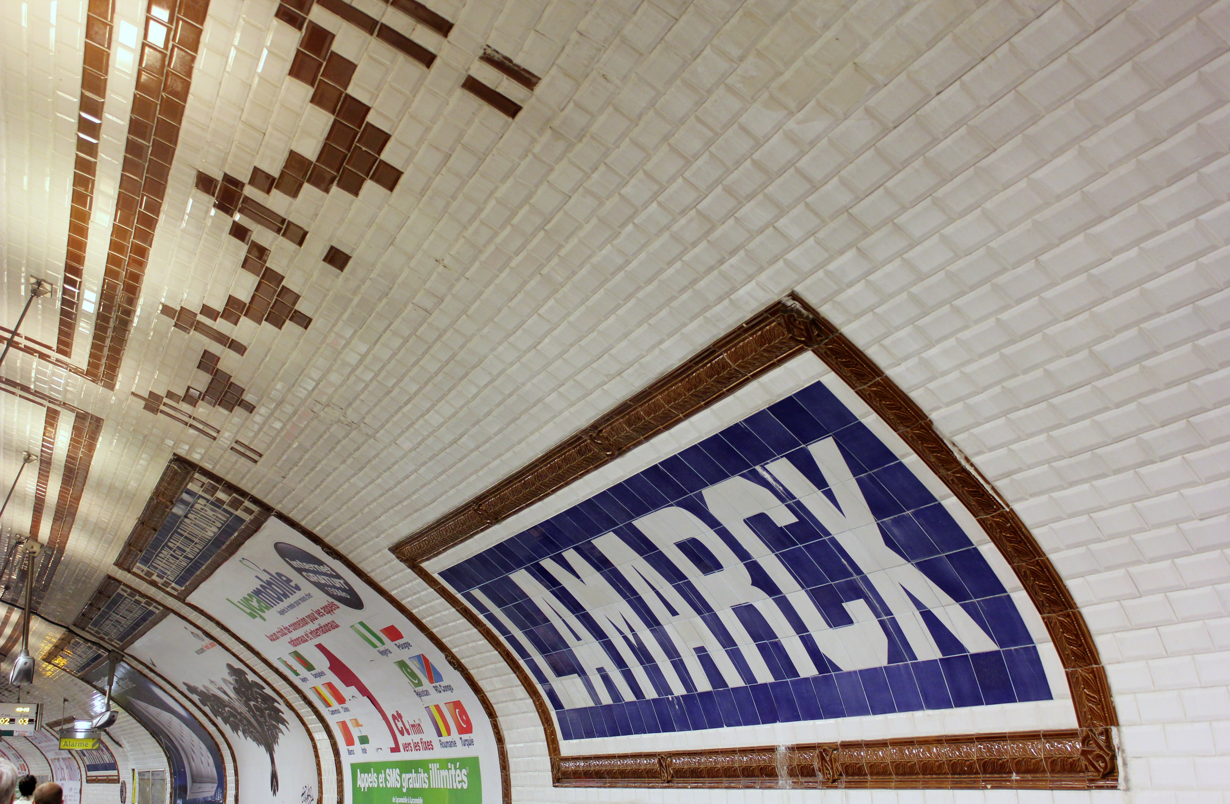 Paris Metro 12 Lamarck - Caulaincourt Stationsschild.